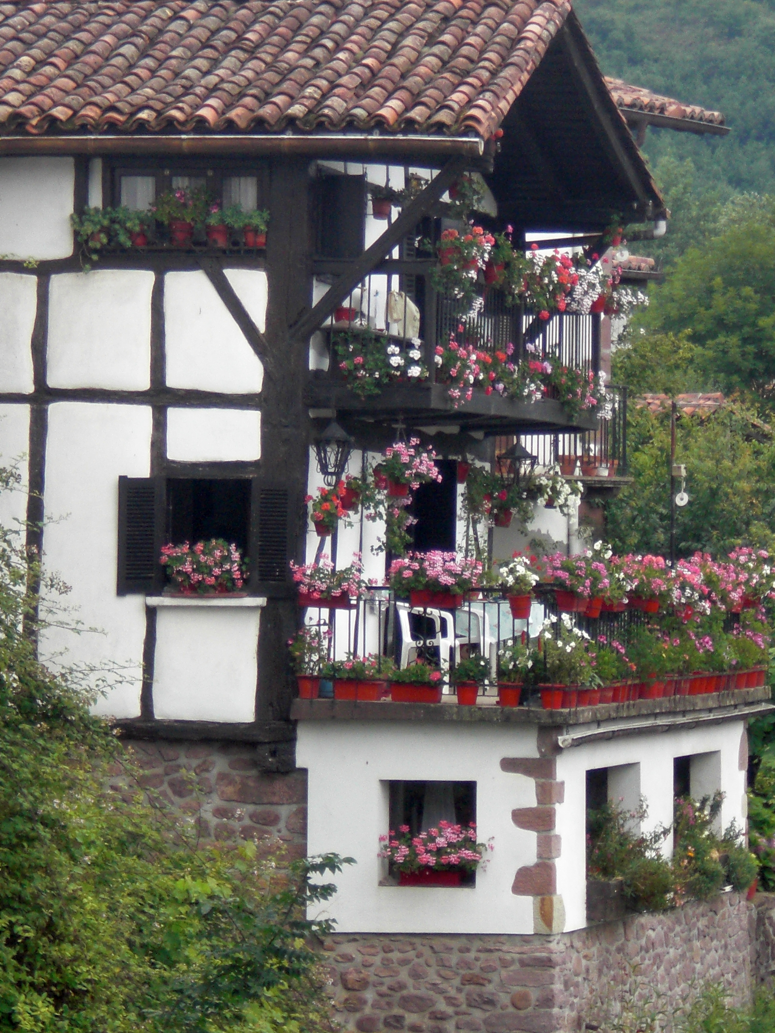 Casas en Elizondo, junto al Bidasoa.